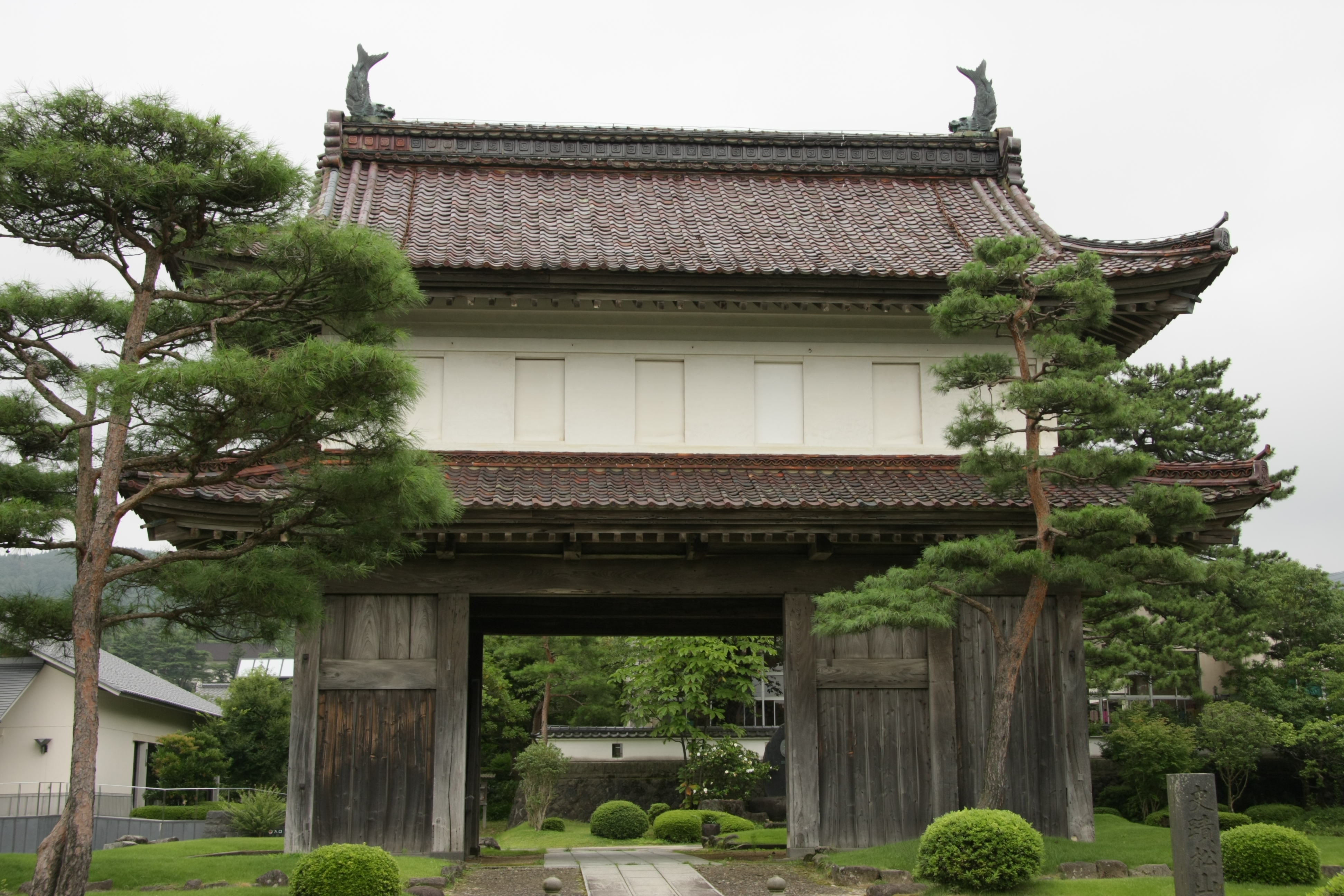 出羽松山城の現存大手門